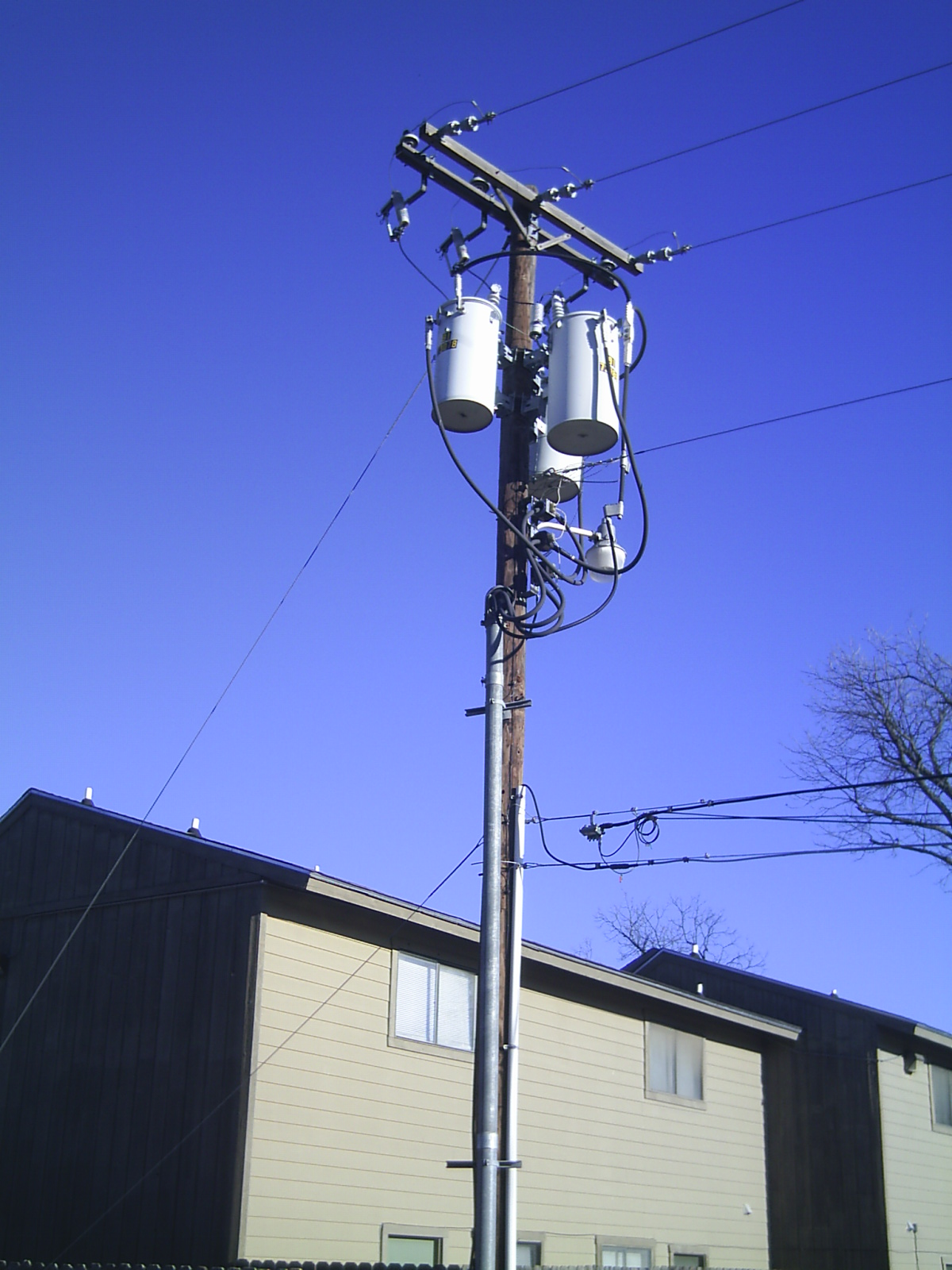 Ein Freileitungsmast in den USA